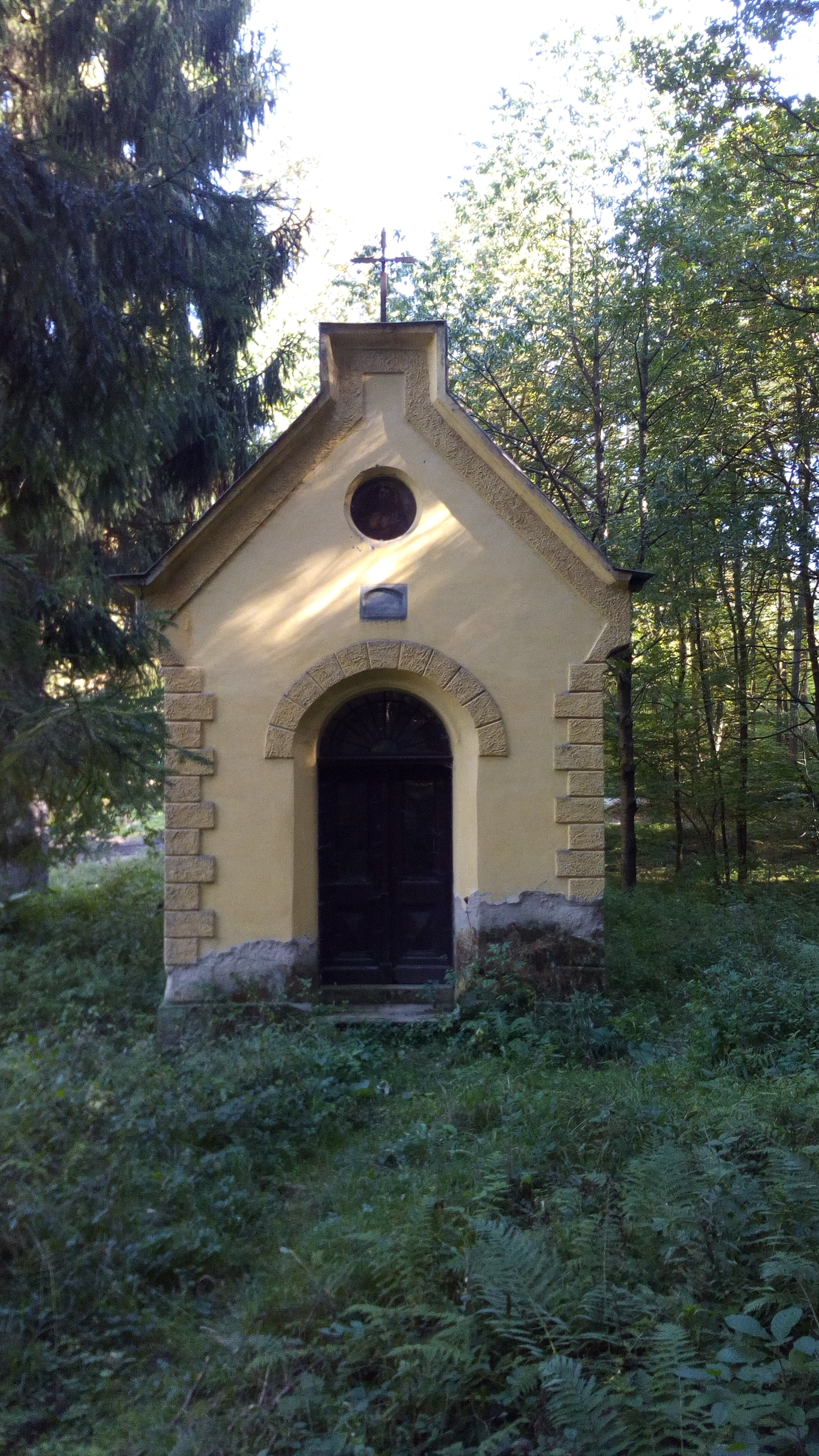 Kaplička Vidnava, Kaple Panny Marie Bolestné (Latzelova kaple)